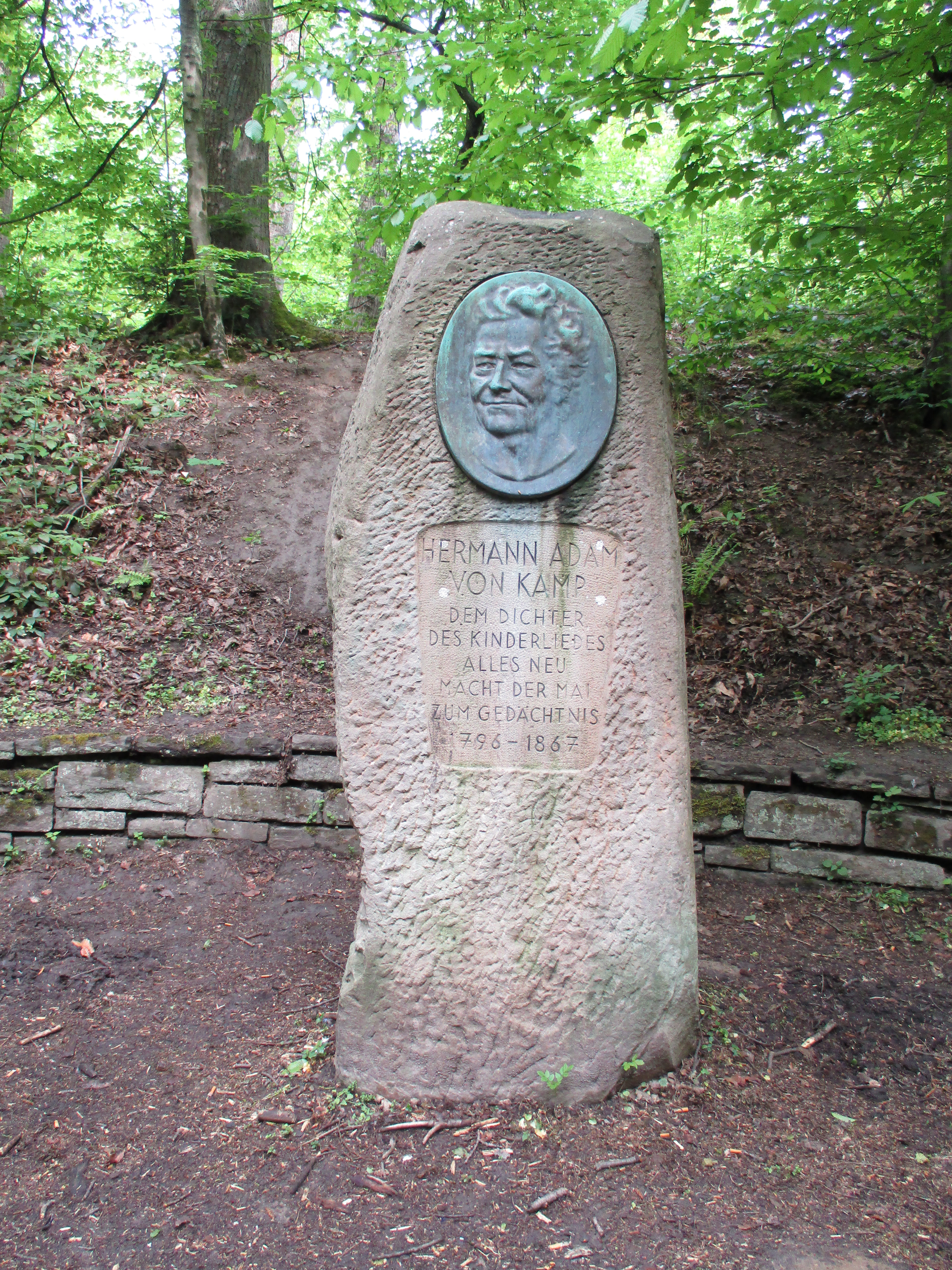 Denkmal Hermann Adam von Kamp im Witthausbusch in Mülheim an der Ruhr. Bekannt wurde der Dichter mit dem Kinderlied "Alles neu macht der Mai".